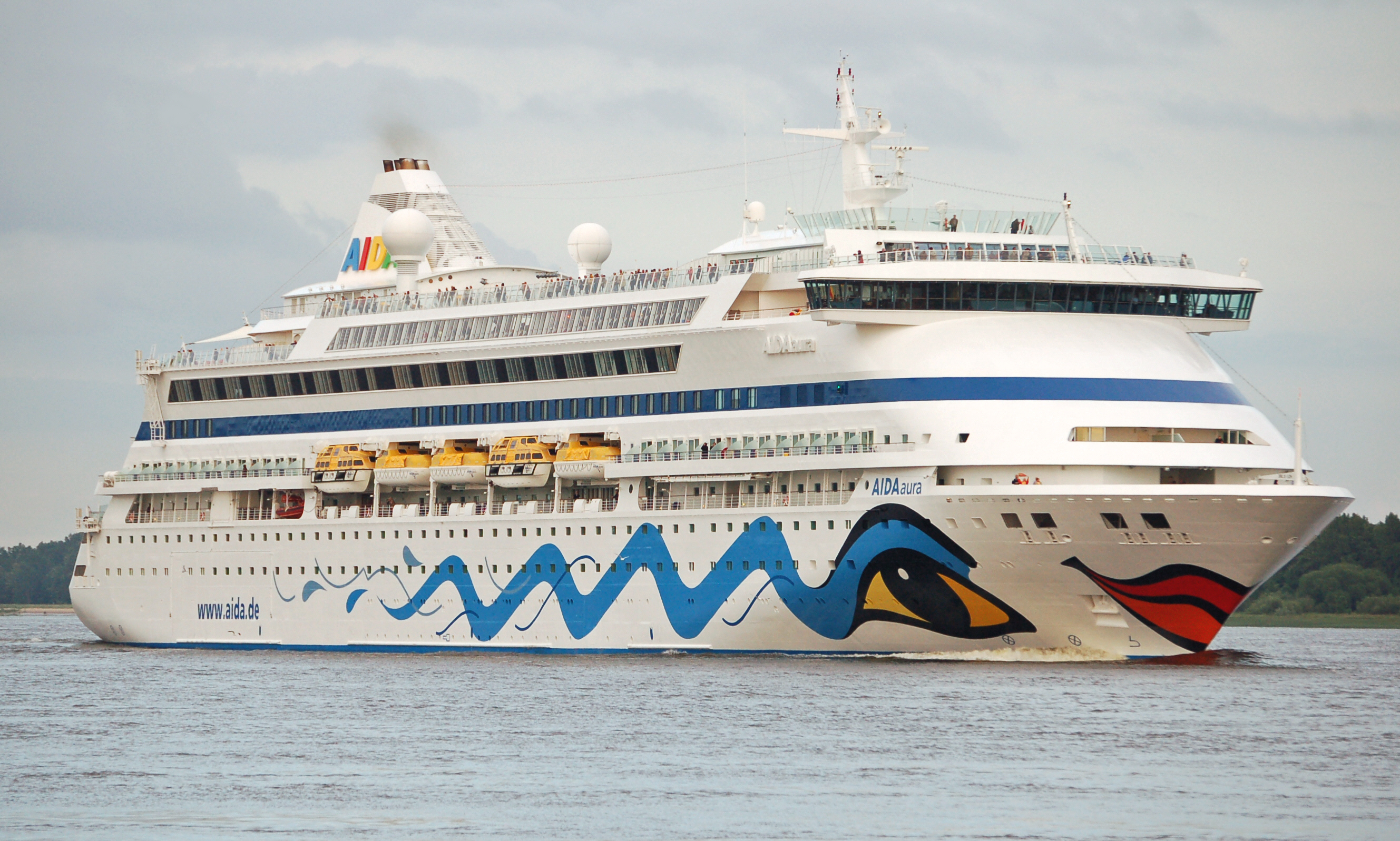 Die AIDAaura am Abend auf der Elbe bei Wedel IMO-Nummer: 9221566 MMSI-Nummer: 247117400 Rufzeichen: IBNZ Länge: 203.0m Breite: 28,0m Flagge: Italy